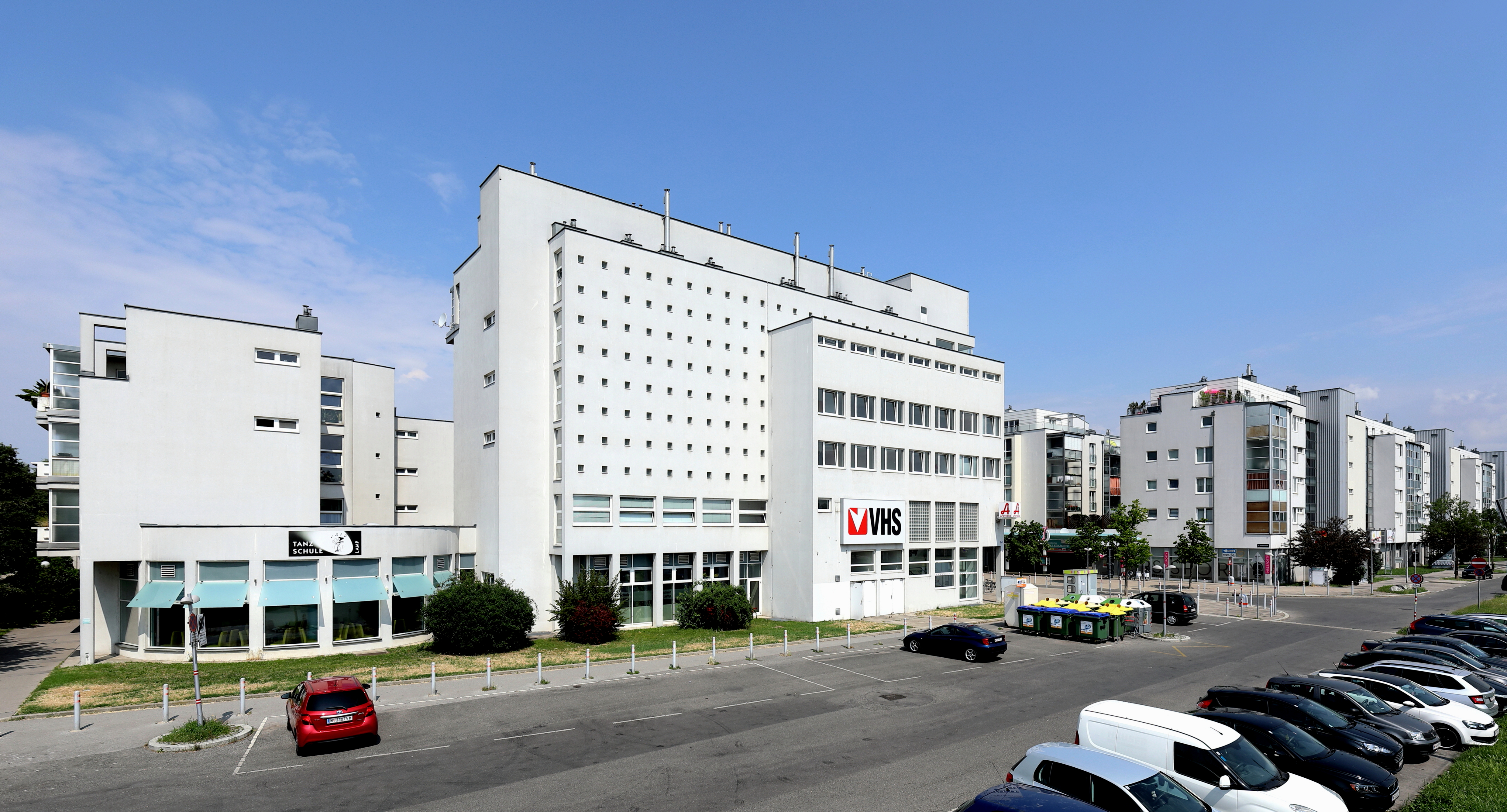 Die Wohnhausanlage der Gemeinde Wien an der Adresse Brünner Straße 219–221 im 21. Wiener Bezirk Floridsdorf. Der Gemeindebau mit 196 Wohneinheiten wurde von 1992 bis 1995 nach Plänen der Architekten Sepp Frank, Kurt Hlaweniczka und Dieter Hayde errichtet. This media shows the Vienna residential building (Gemeindebau) with the ID 1769.